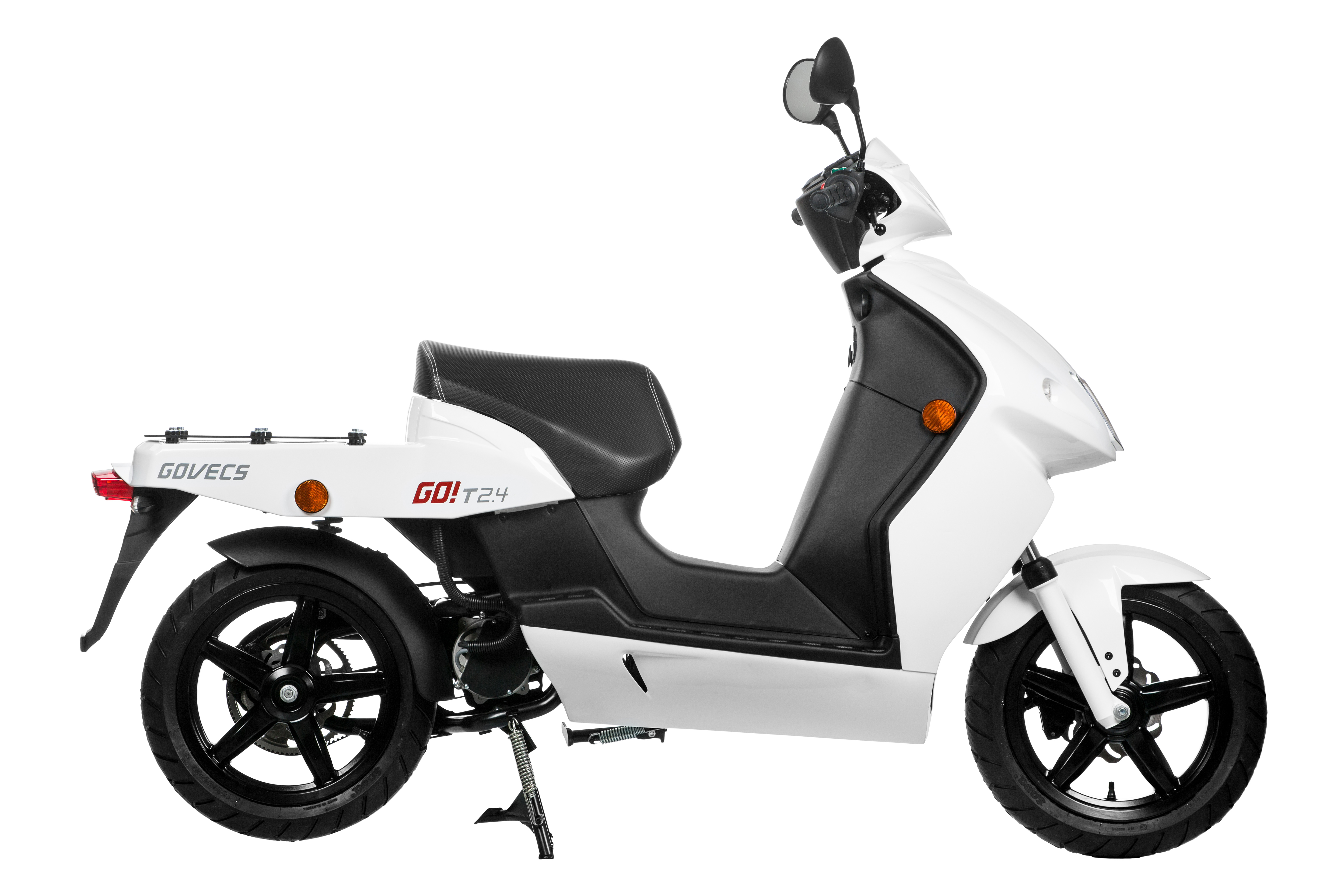 GOVECS GO! T24 right without box